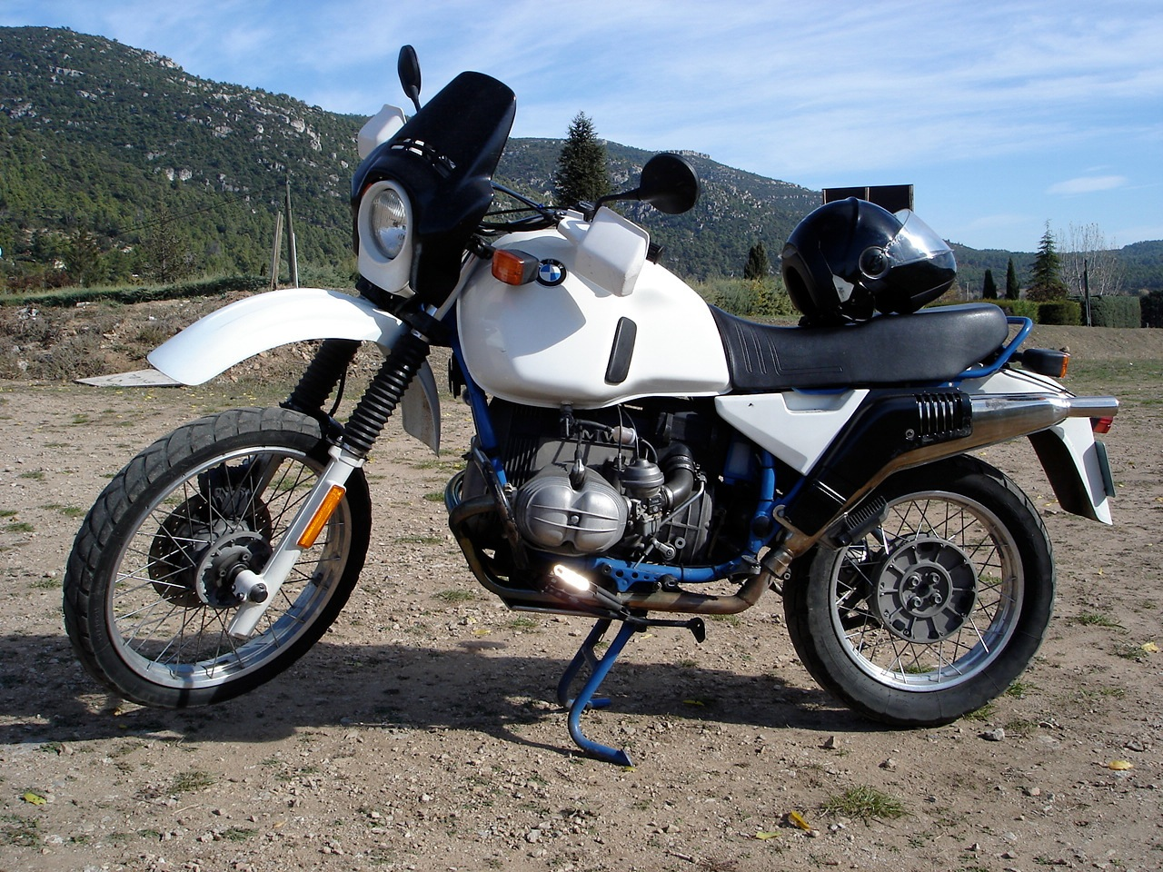 Moto de Airplume